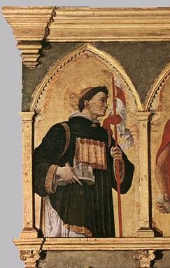 detail: San Daniele de Padua